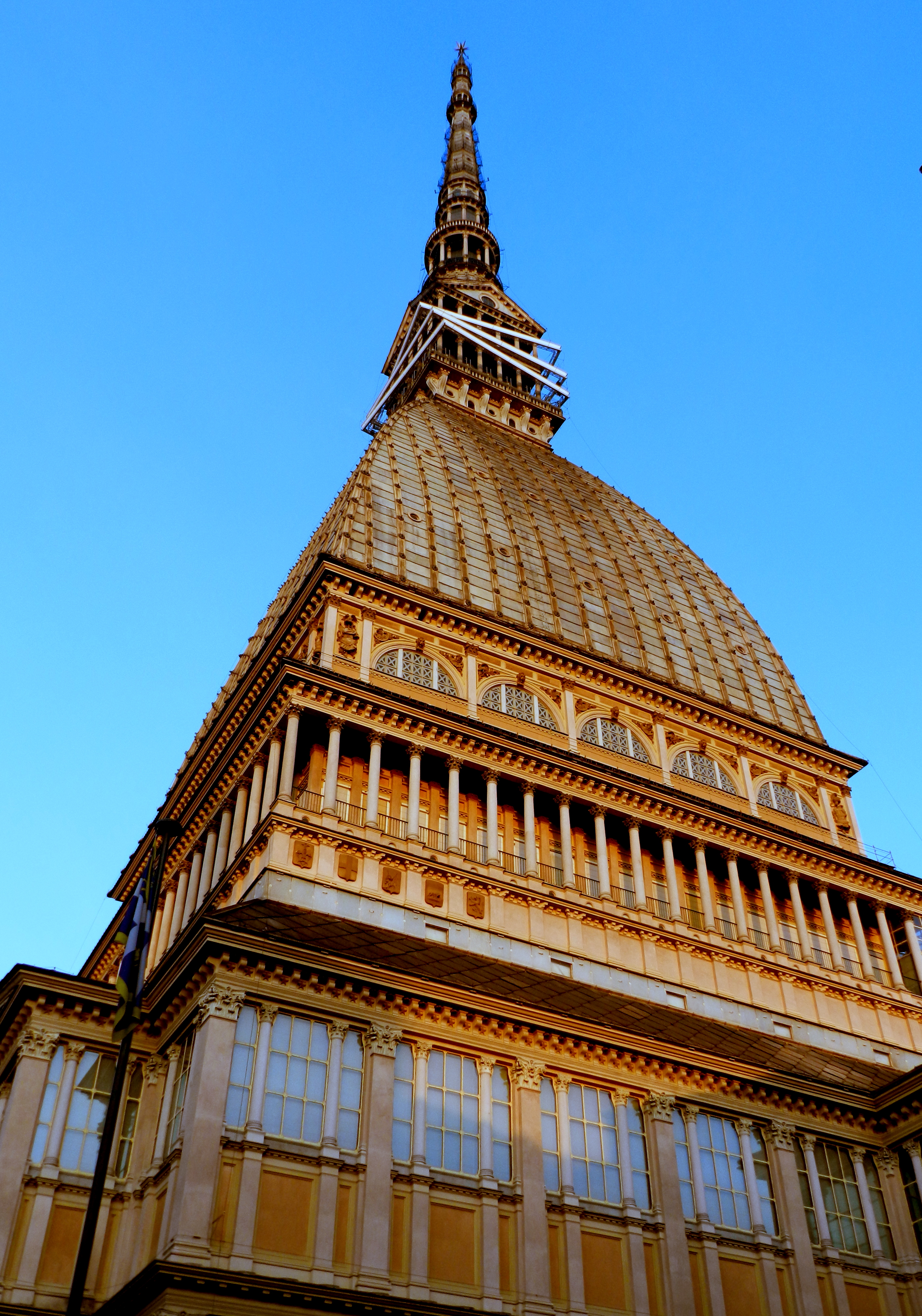 Ripresa dal basso della Mole Antonelliana (Torino)